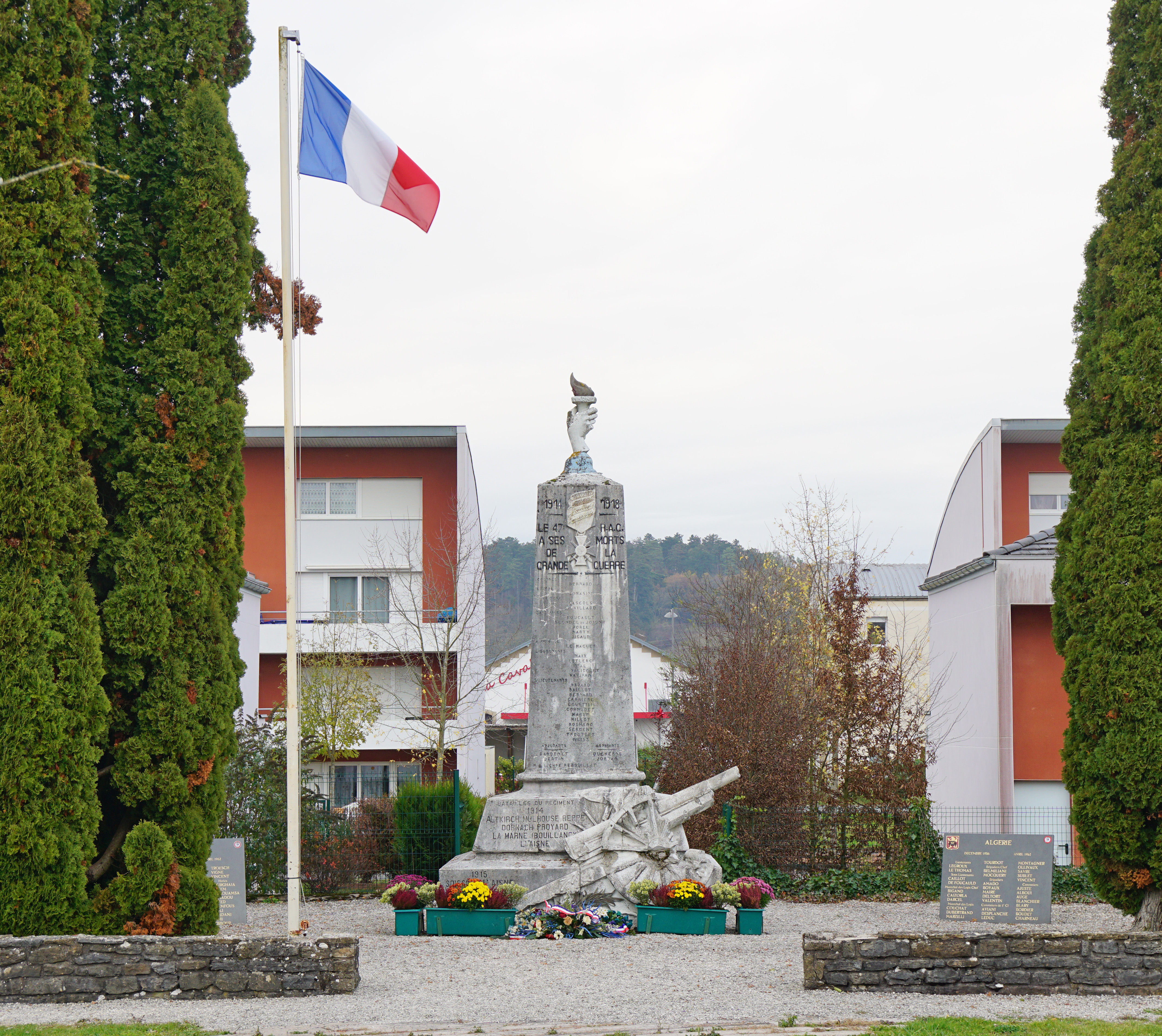 Le monument aux morts du 47e régiment d'artillerie à Héricourt en Haute-Saône.